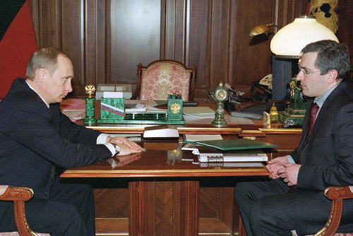 МОСКВА, КРЕМЛЬ. С председателем правления нефтяной компании «ЮКОС» Михаилом Ходорковским.